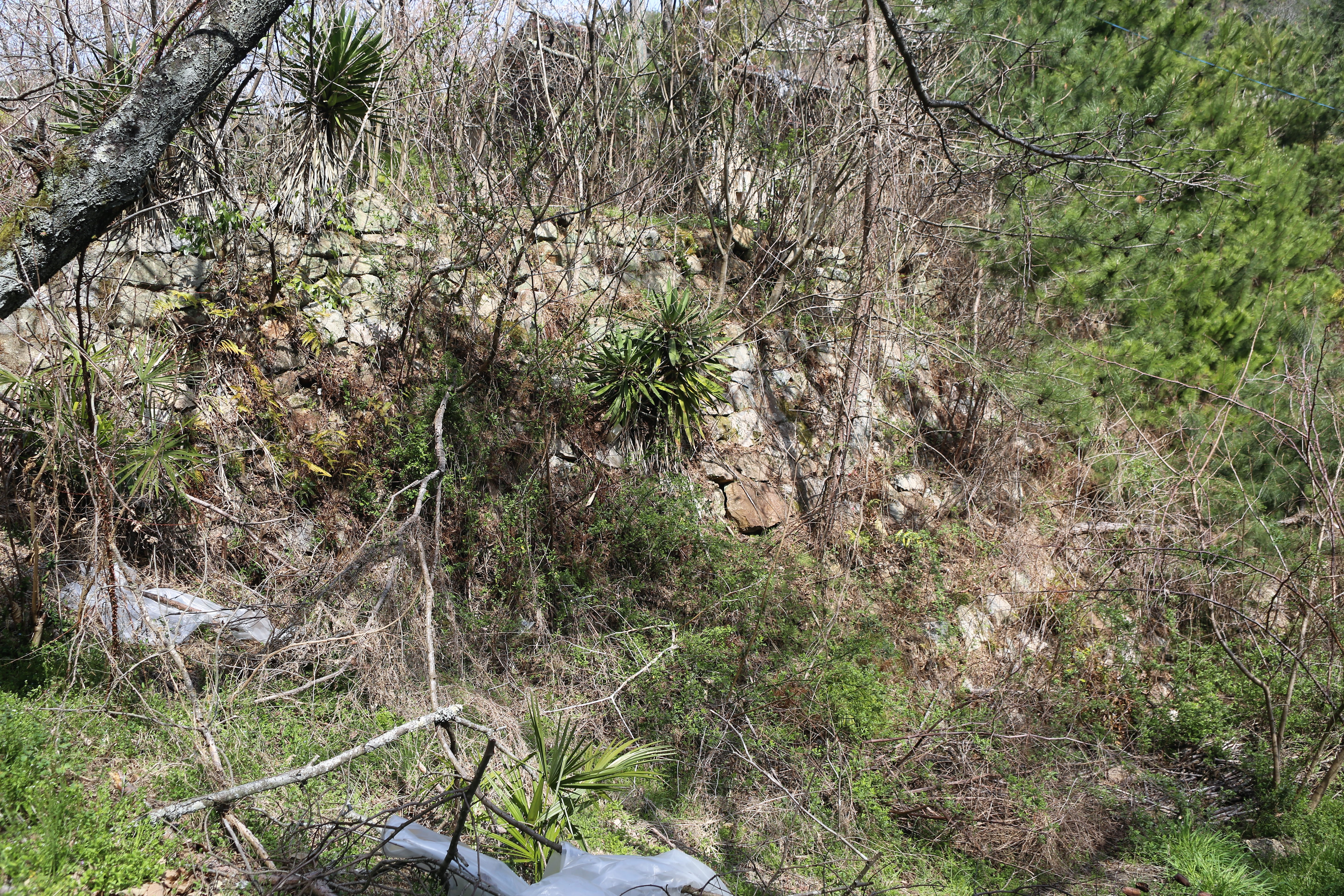 広島県福山市本郷町本郷温泉地区にある第三本郷砂留。松や雑草に覆われ、全容は見えないが、斜面になっている部分が砂留。